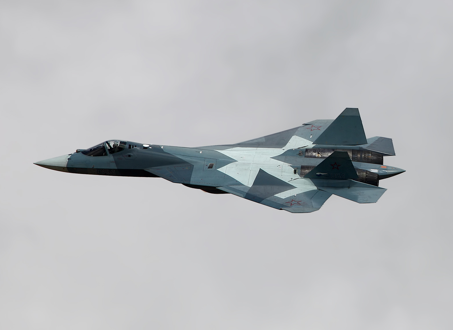 Т-50 ПАК ФА (T-50 PAK FA)